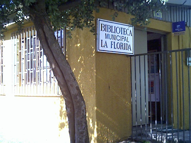 es la entrada de la Bibliteca de la Florida N° 256 de Talca. en los años 90